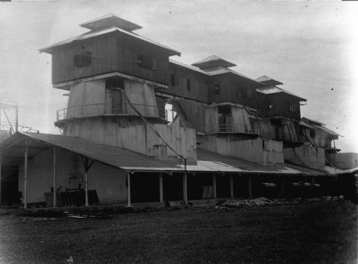 Foto. De overjarige cultures ter oostkust van Sumatra in woord en beeld. Door de A.V.R.O.S. eerbiedig opgedragen aan Z.E. den Gouverneur-Generaal van Nederlandsch-Indië Mr. D. Fock. De verstuivingstorens voor het maken van sprayed rubber van de rubberfabriek van de United States Rubber Plantations, Inc. te Boenoet